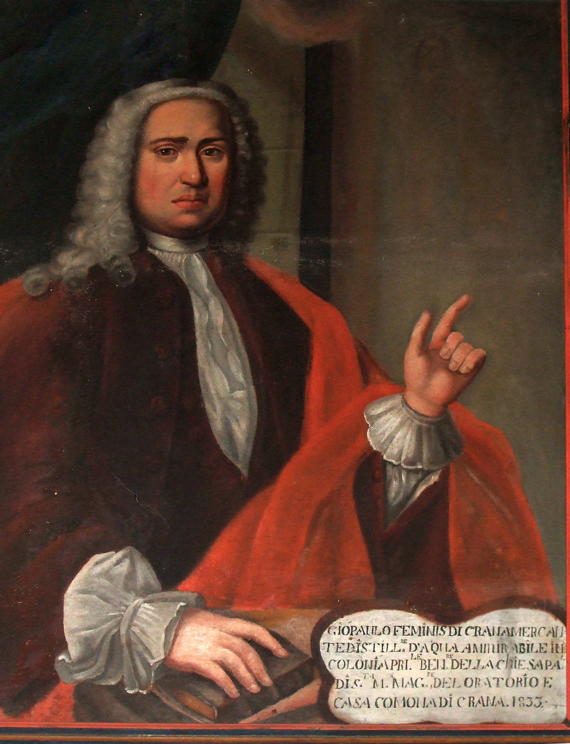 Ritratto attribuito a Giovanni Paolo Feminis (ca 1660-1736) custodito nella sacrestia della chiaesa di San Rocco a Crana, Val Vigezzo. L'attribuzuioone è incerta. Secondo alcuni il ritratto sarebbe di Monsieur Dinocheau, membro della famiglia promotrice della fondazione per la chiesa di Saint Roch nella Rue Saint Honoré a Parigi. Dr.Karl Kempkes:Analisi del valore documentario dei cosiddetti Ritratti di Feminis Ritratto di Giovanni Paolo Feminis (ca 1660-1736) custodito nella sagrestia della chiesa di Crana. Fotografia di Gianmarco Ceccomori con licenza d'uso